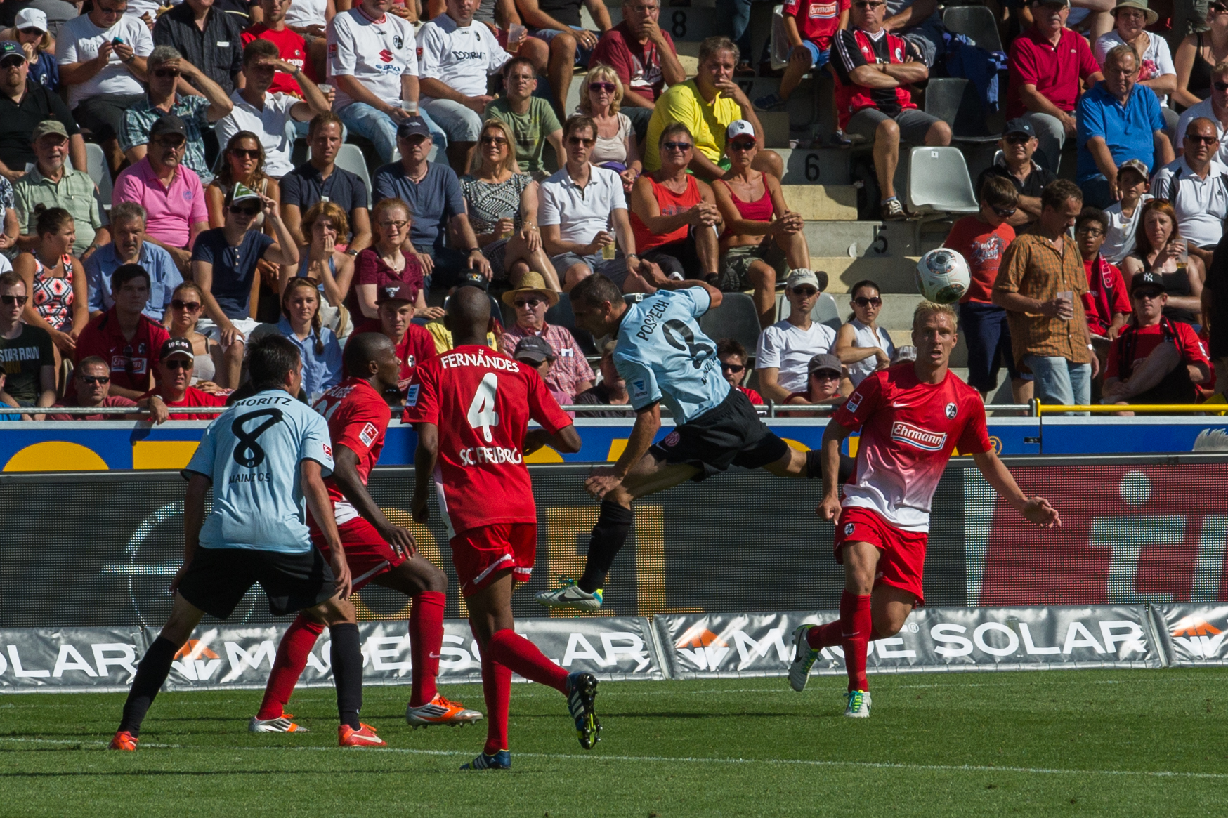 2ème journée de Bundesliga. Match SC Freiburg vs FSVMainz au MAGE SOLAR Stadion le samedi 17 août 2013.